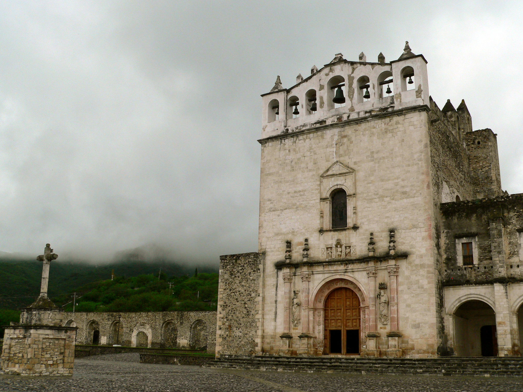 Templo y exconvento de los Santos Reyes